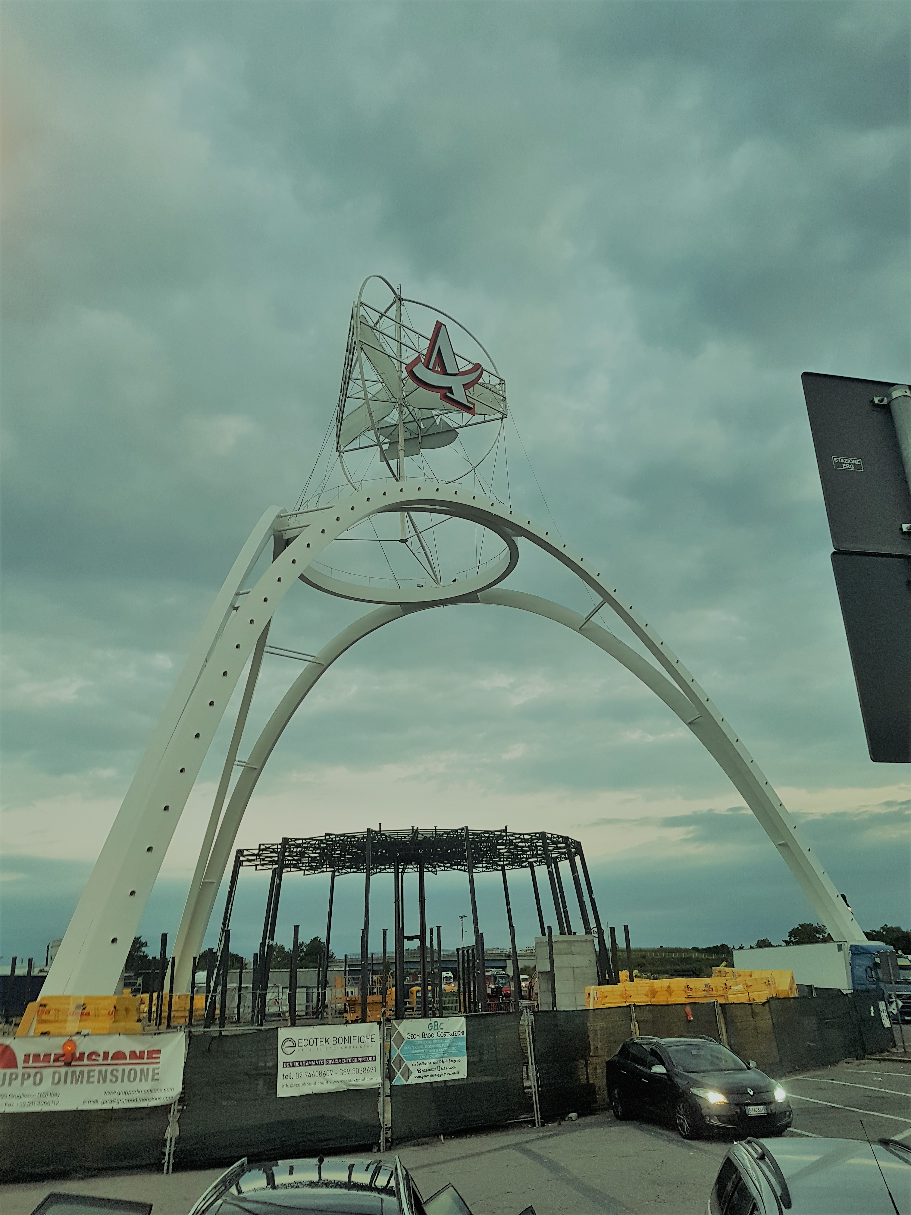 Autogrill "a piramide spaziale" di Villoresi Ovest in rifacimento